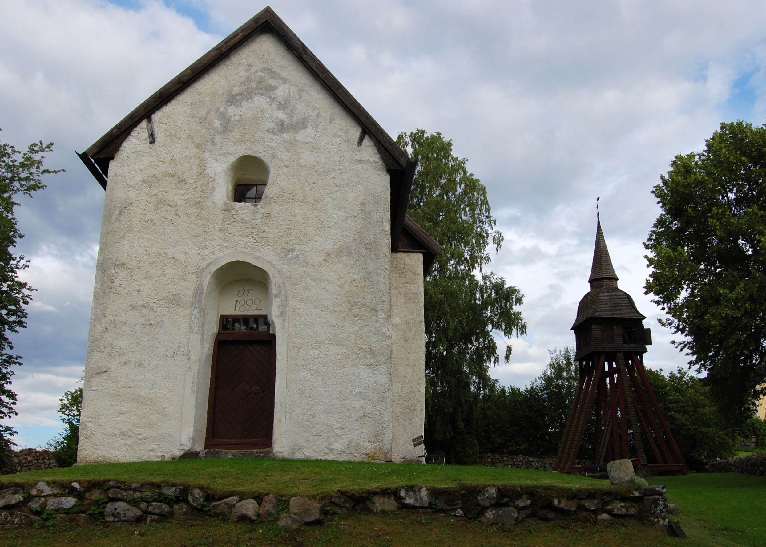 Alte Kirche von Vallsjö mit Turm